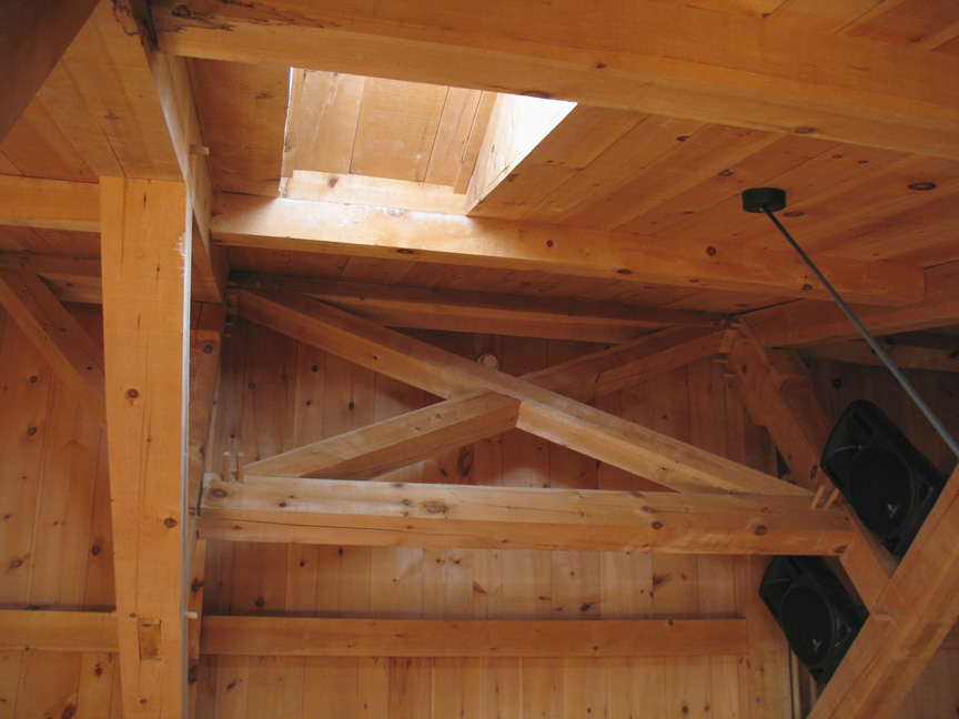 Croix de Saint-André, charpente du Moulin des Jésuites, Ville de Québec (Québec) Canada. Le Moulin des Jésuites de Charlesbourg est un moulin à eau situé à Québec, à l’est de l'arrondissement historique de Charlesbourg (Trait-Carré). Il a été construit en pierre en 1740 et a cessé de fonctionner en 1940. Il abrite aujourd'hui un centre d'interprétation historique.